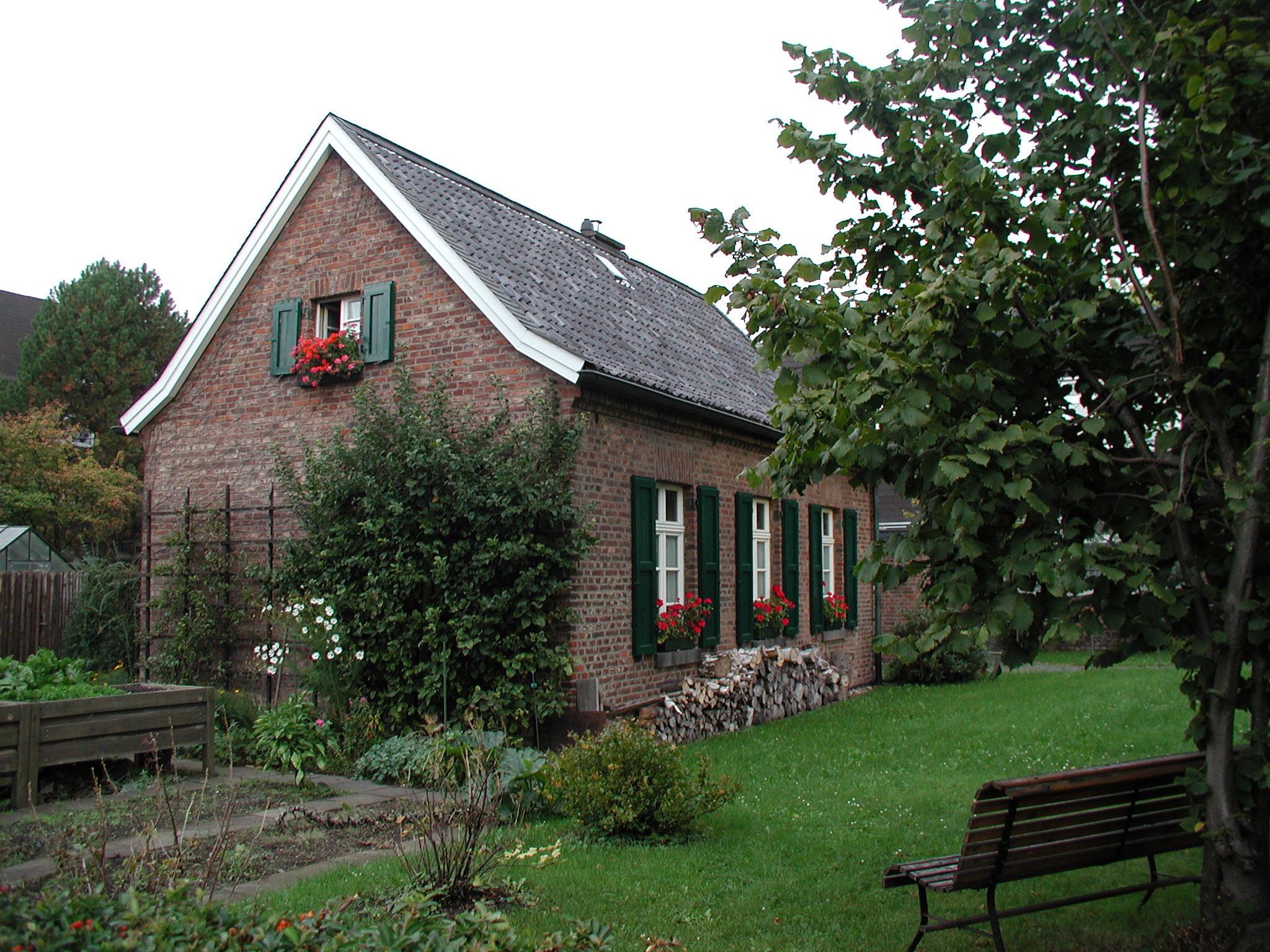 Köln Lindenthal, Kriel-Zwergschule